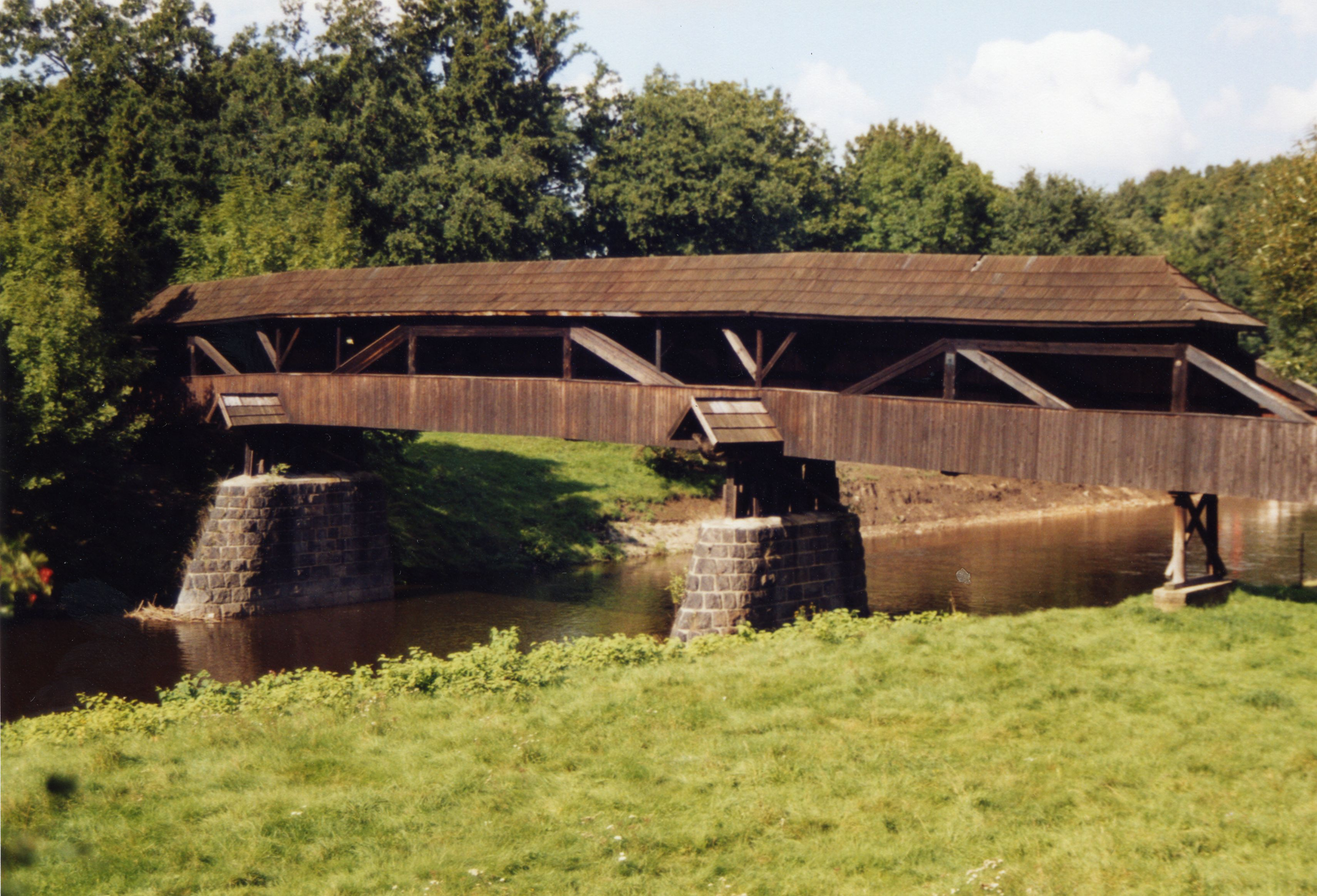 Historische Brücke "Röhrensteg" über die Zwickauer Mulde in Zwickau